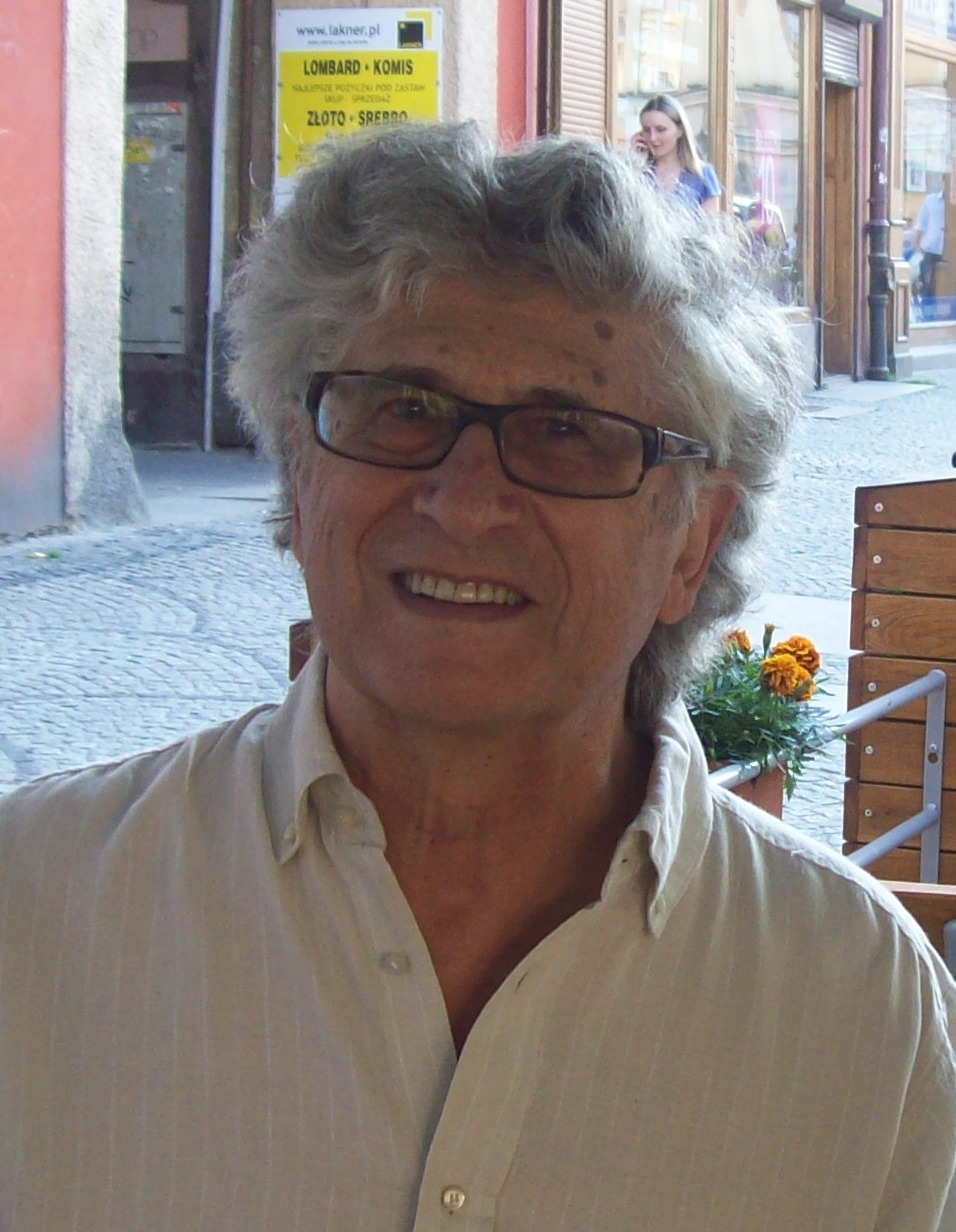 Feliks Falk